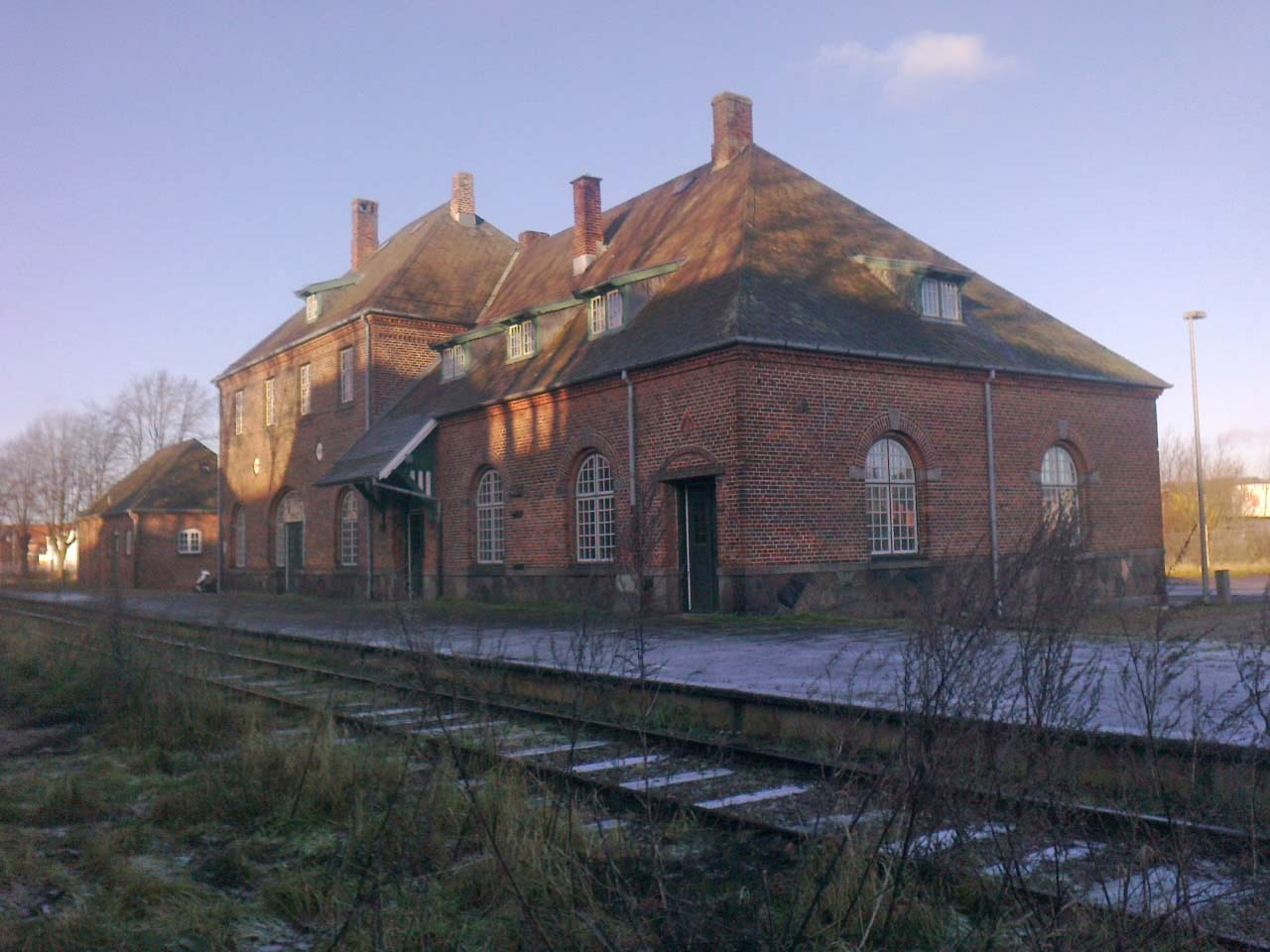 Strømmen station set fra banesiden